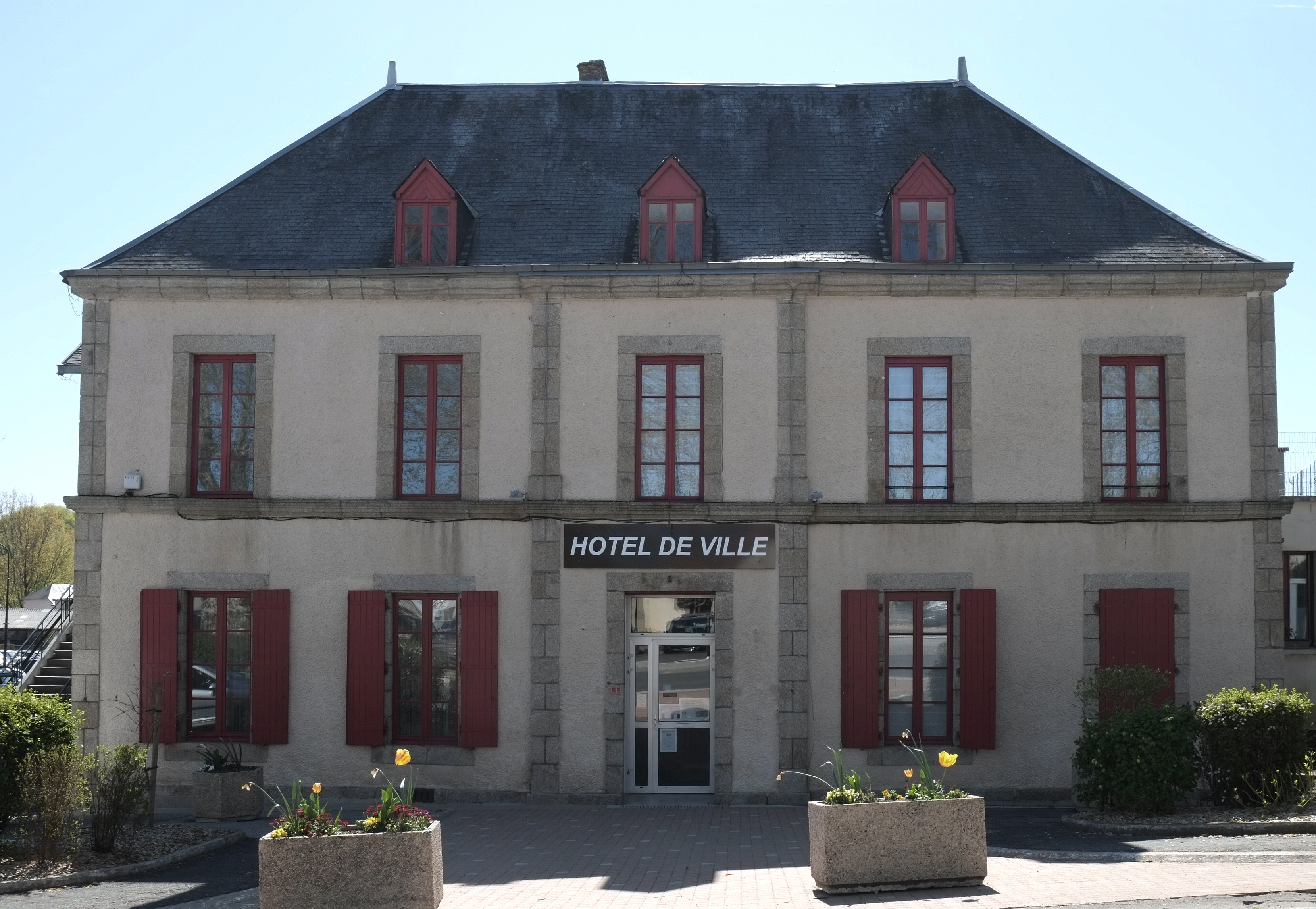 Mairie Secondigny Deux-Sèvres France